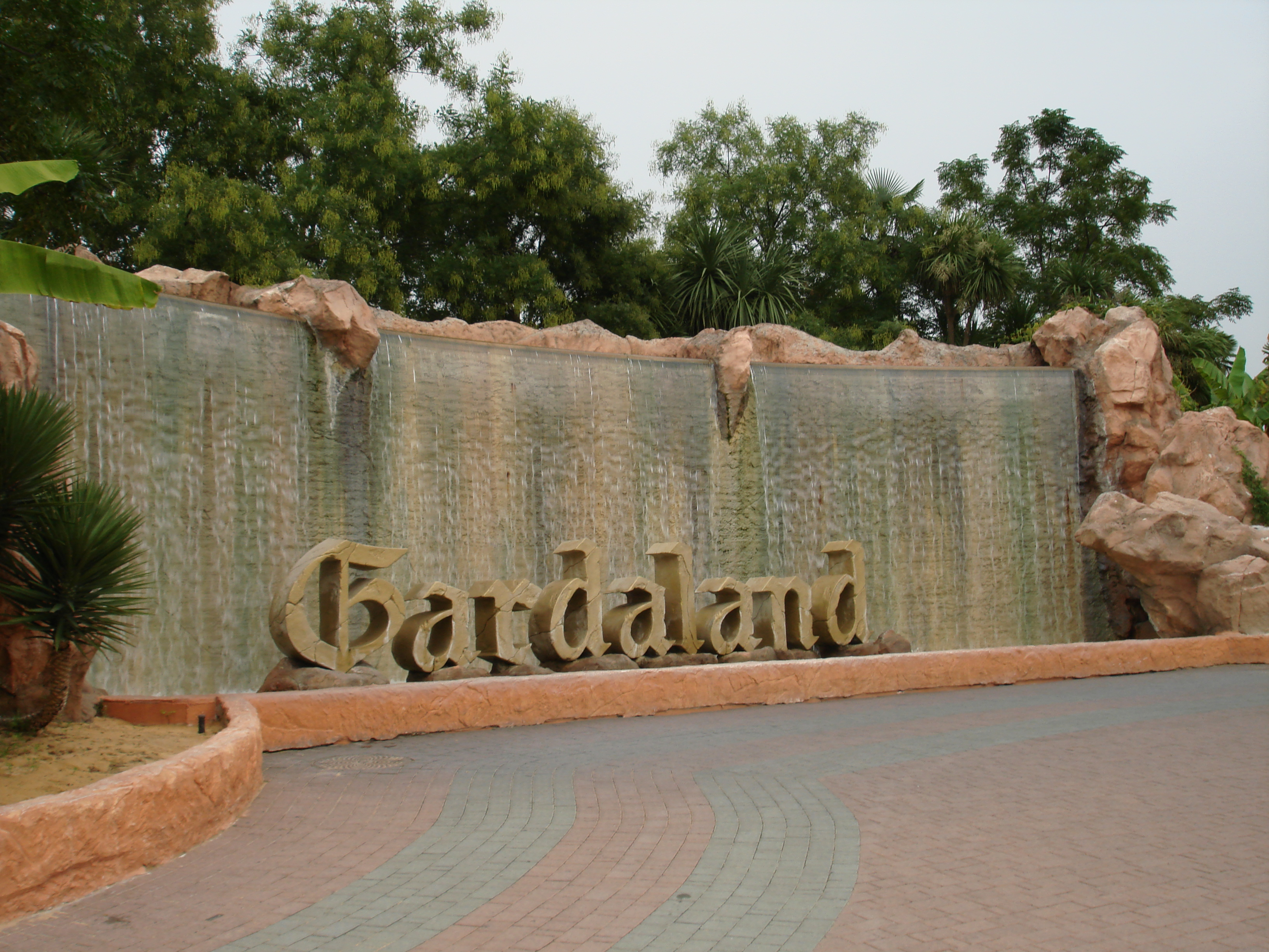 Fontata Entrata Gardaland